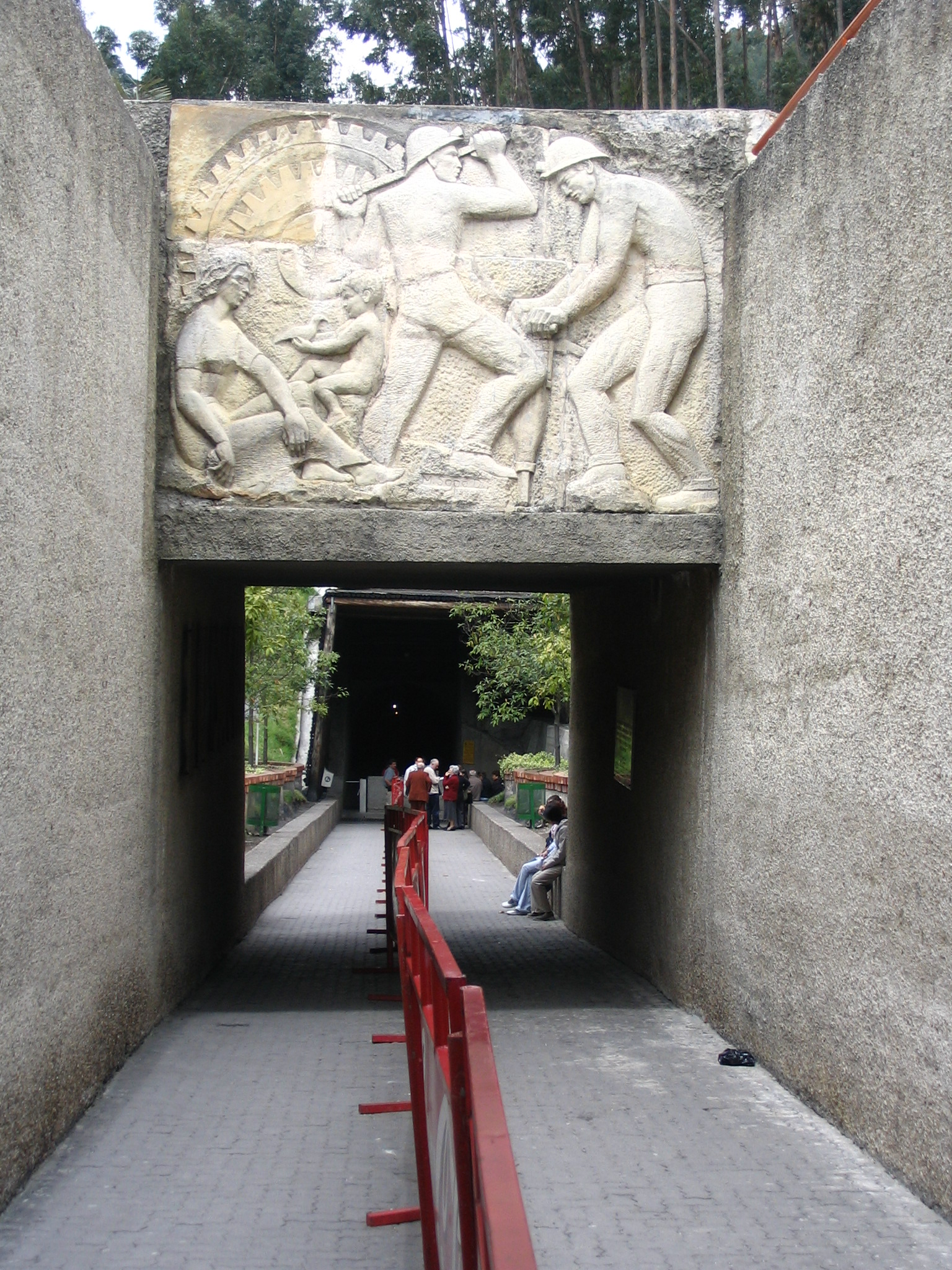 Entrada al túnel de acceso a la Catedral de Sal de Zipaquirá. Fotografía tomada por Tequendamia para la Wikipedia Categoría:Colombia (imagen)